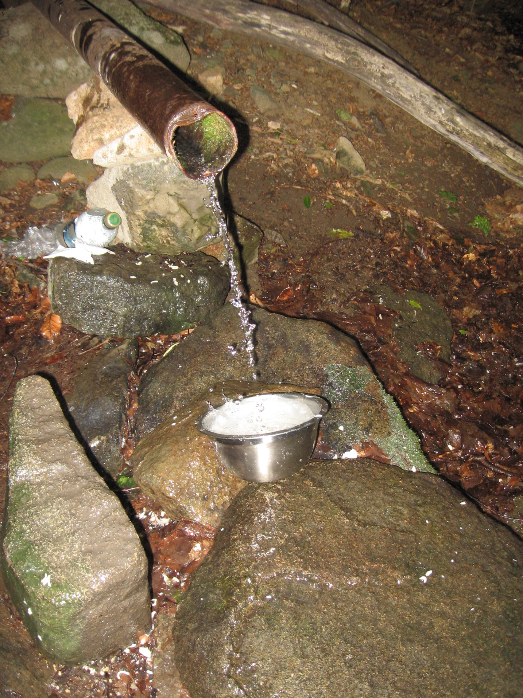 Ак-Чокрак: Фото